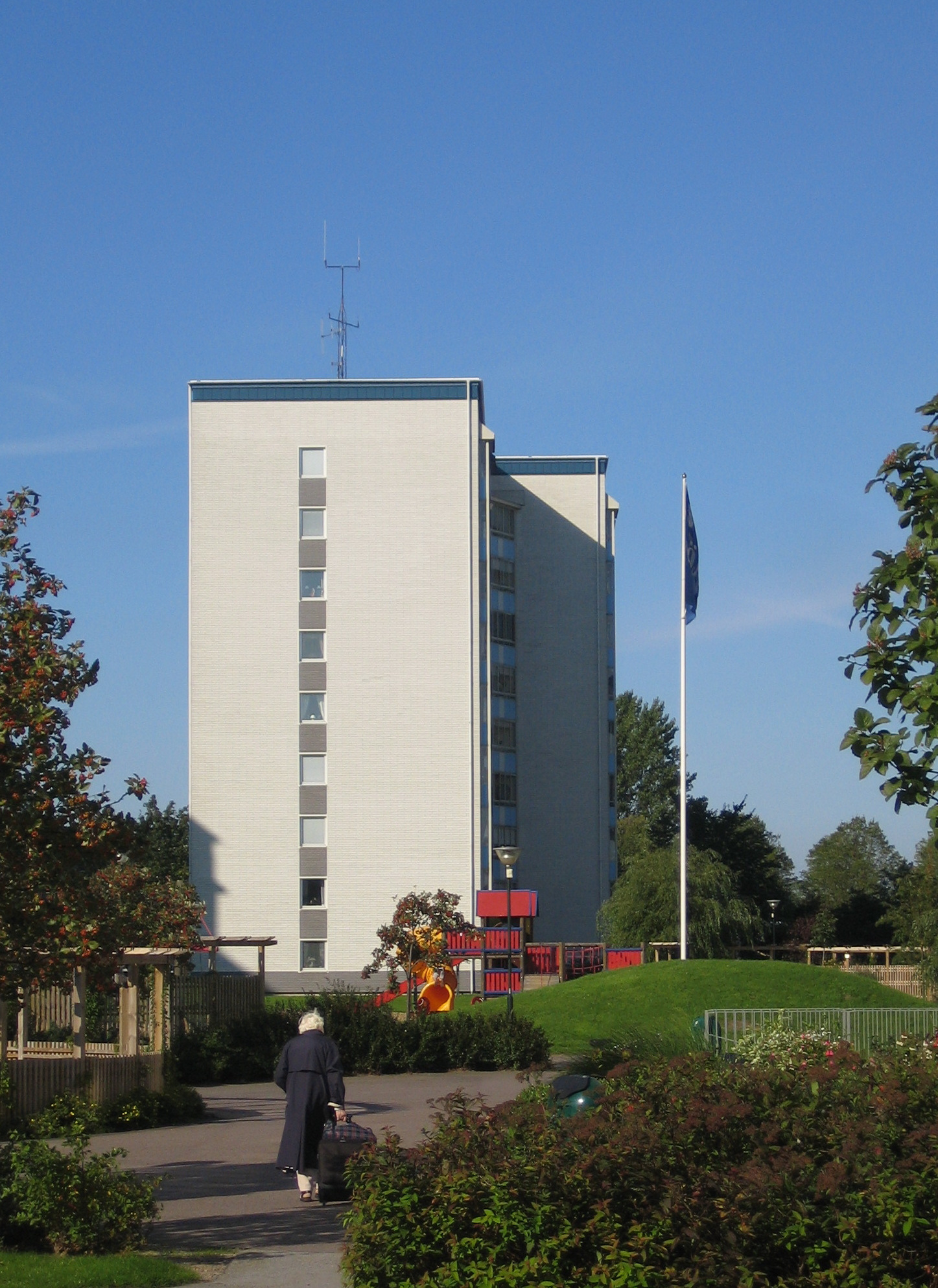 Vita Höja, Malmö, Sweden